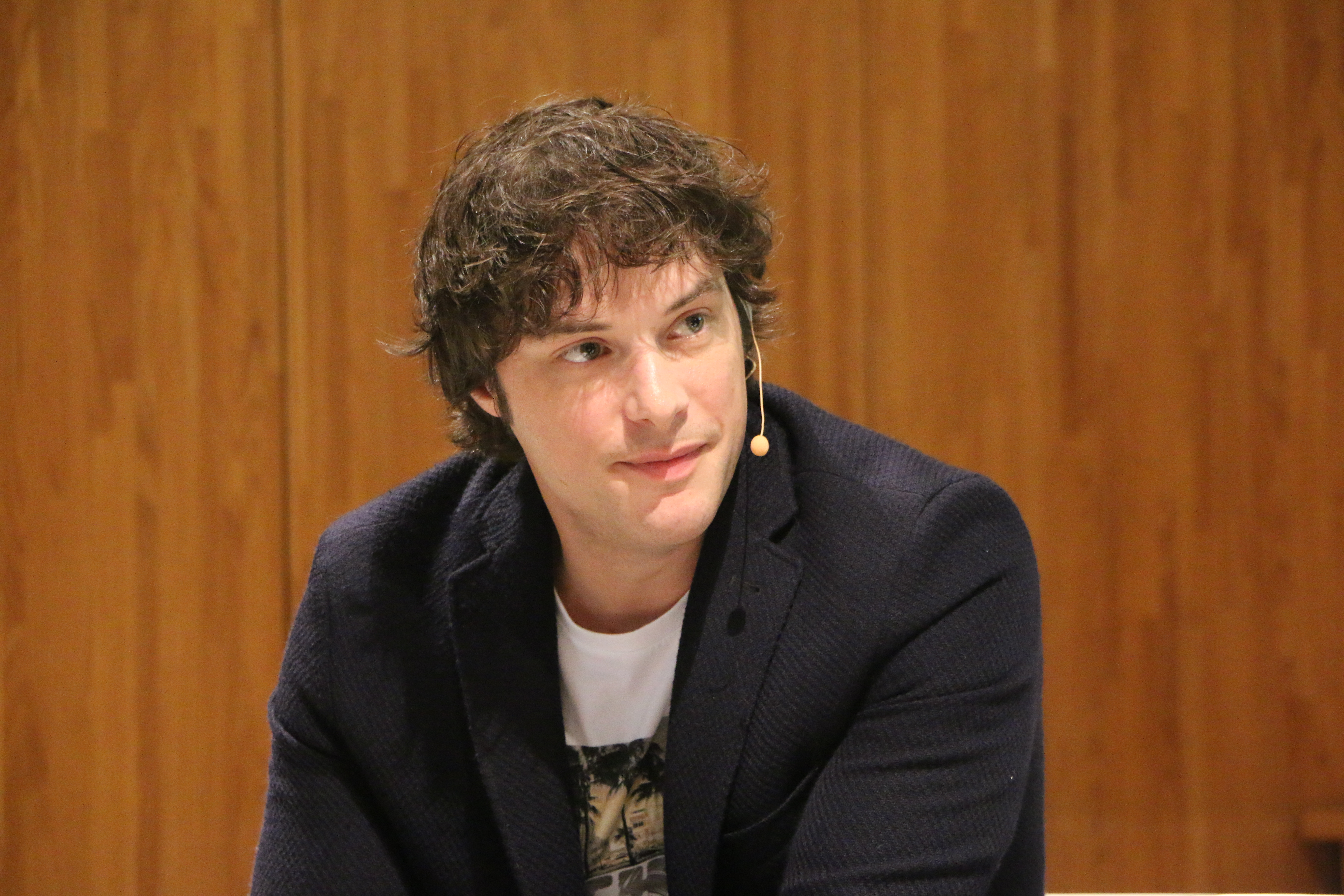 La gastronomia, estrella de la comunicació?